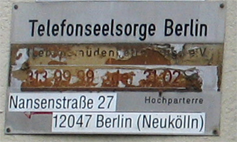 Hinweisschild auf die Berliner Telefonseelsorge in Jebenstraße 1.